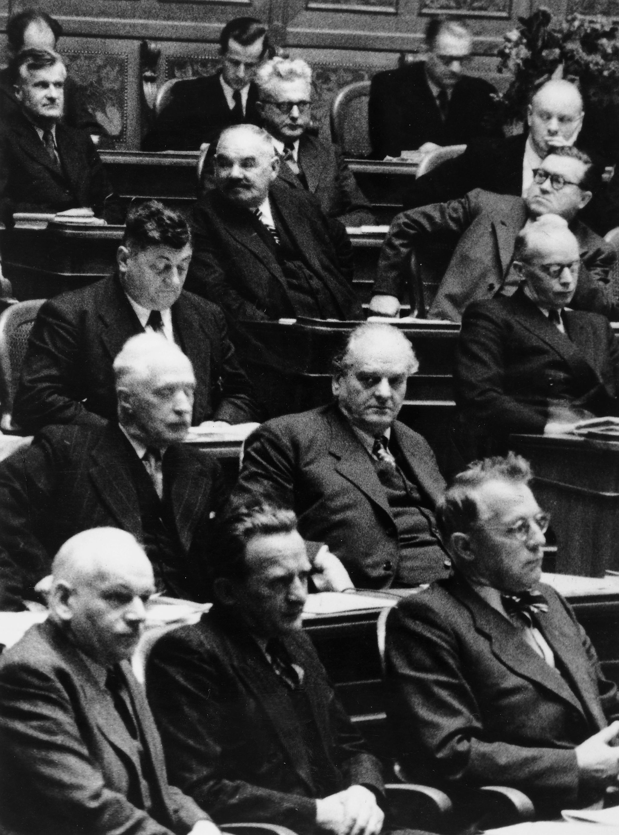 Gottlieb Duttweiler als Politiker: Nationalrat